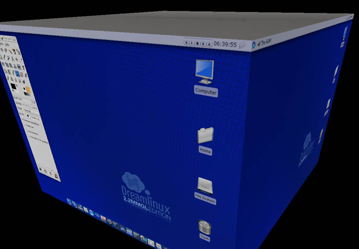 Dreamlinux Beryl Desktop